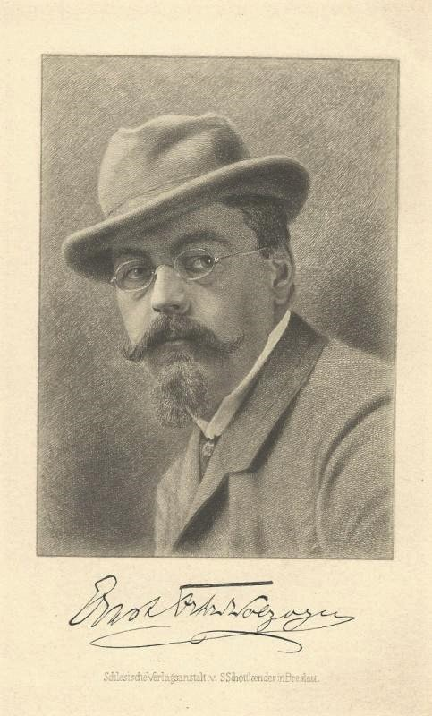 Porträt Ernst Freiherr von Wolzogen. Radierung von Johann Lindner mit faksimilierter Unterschrift des Porträtierten